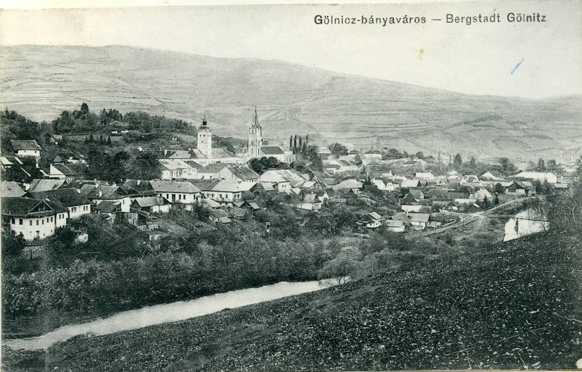 pohľadnica Gelnica, začiatok 20.storočia